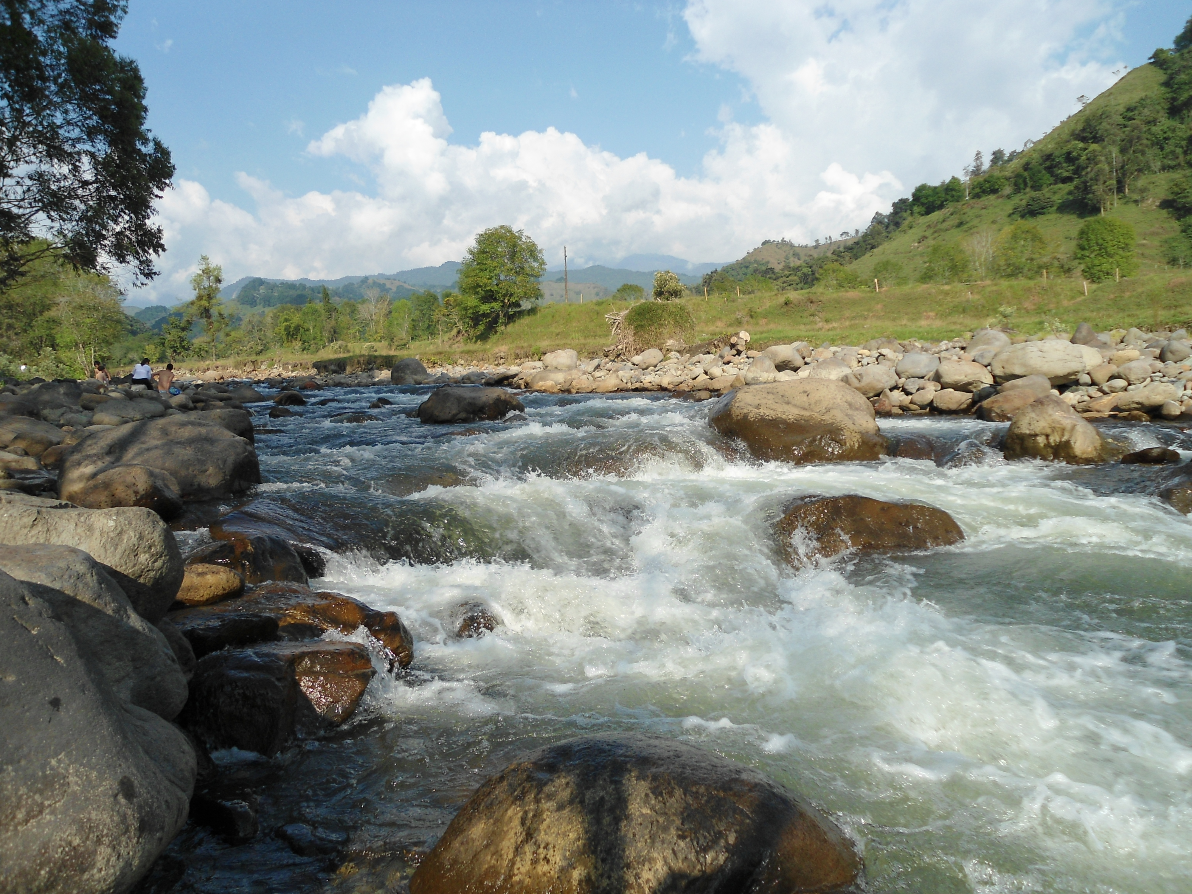 Rio en la carretera de entrada a Salento